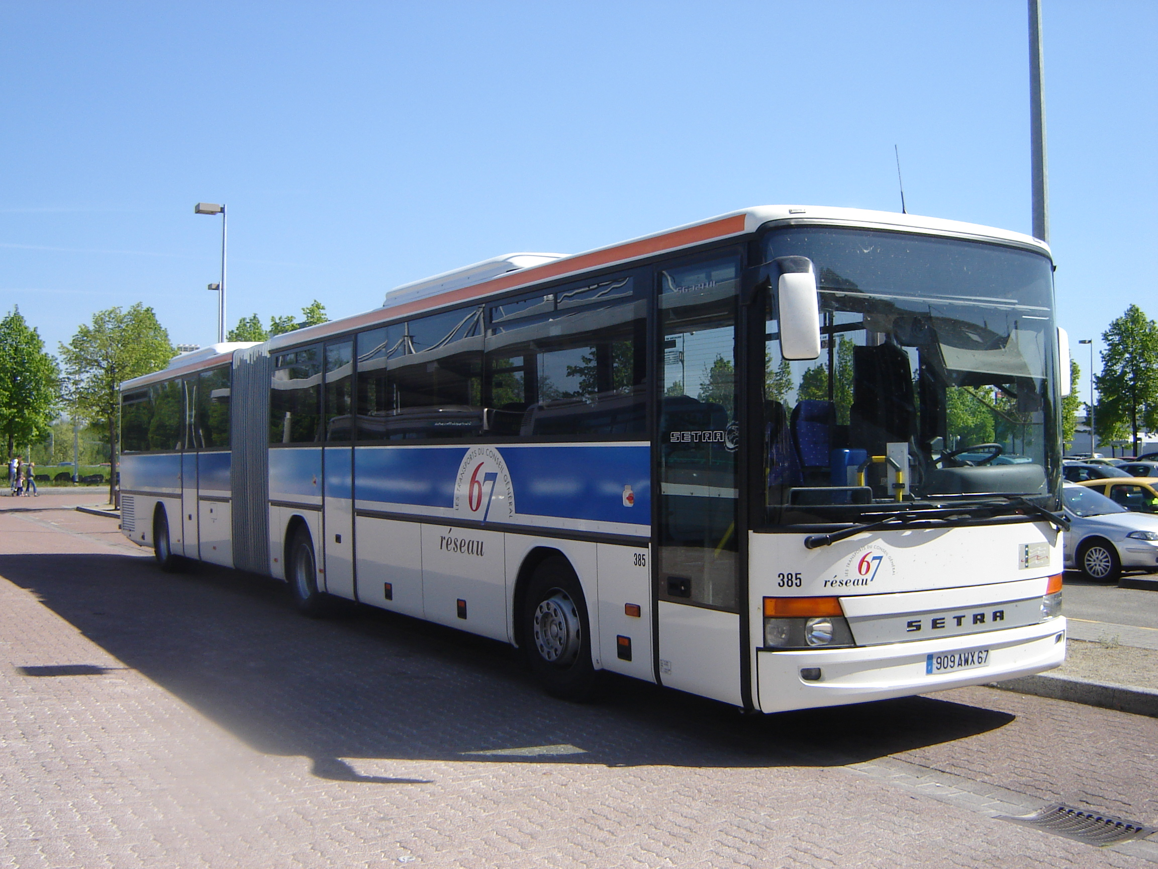 SG 321 UL à Rotonde, Strasbourg.